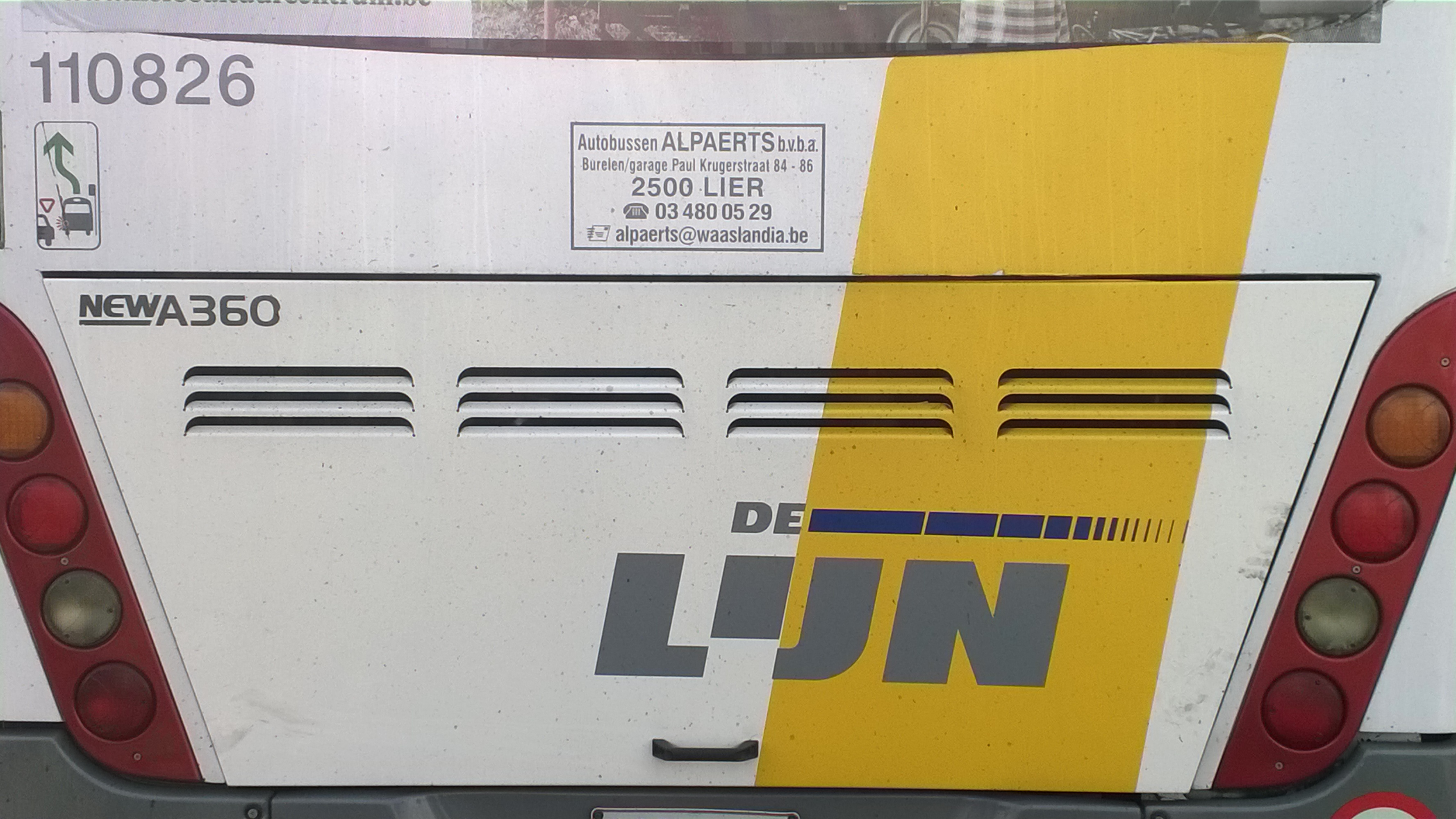 Achterflank van bus exploitant Alpaerts